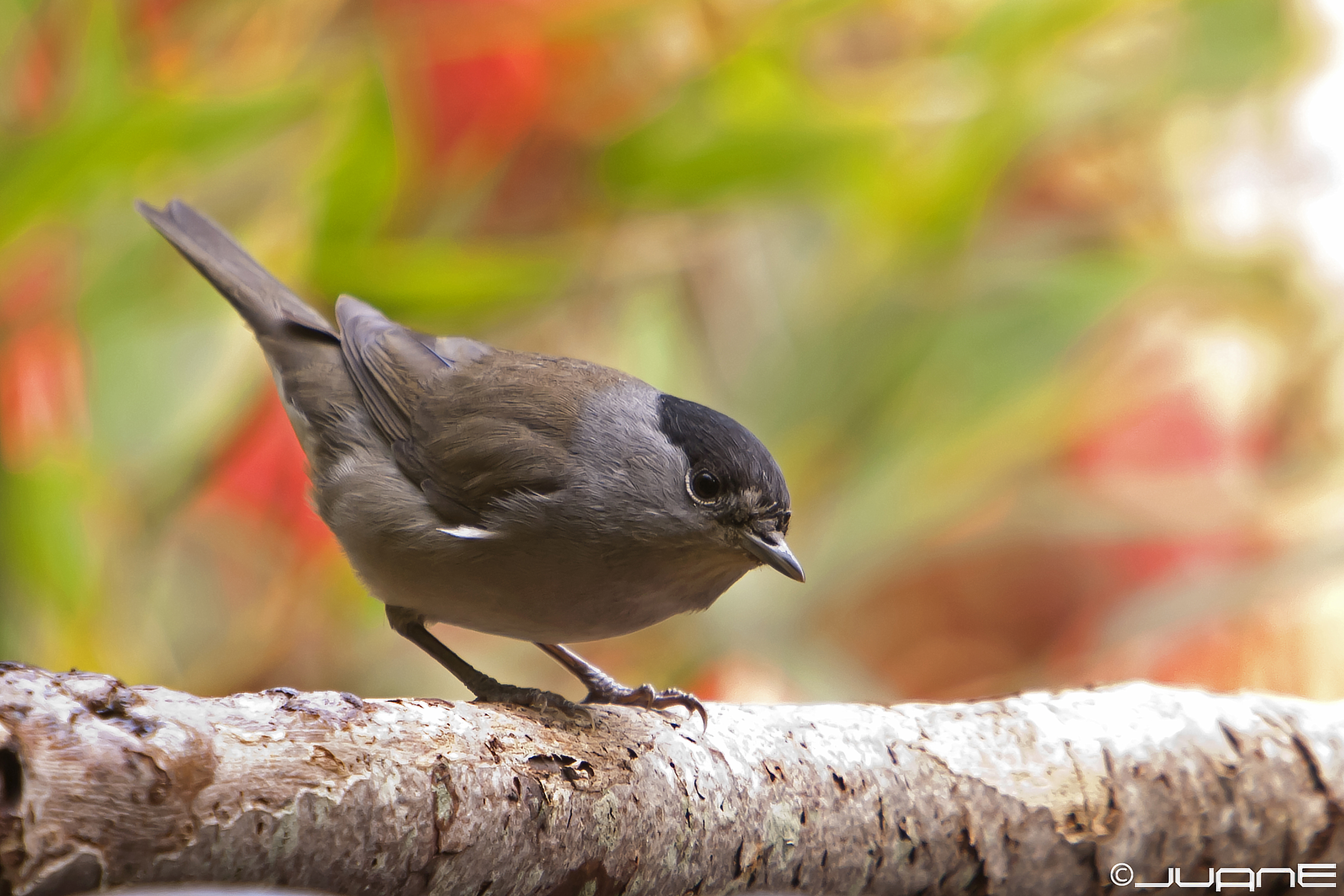 Curruca capirotada – Sylvia atricapilla (♂) Joven